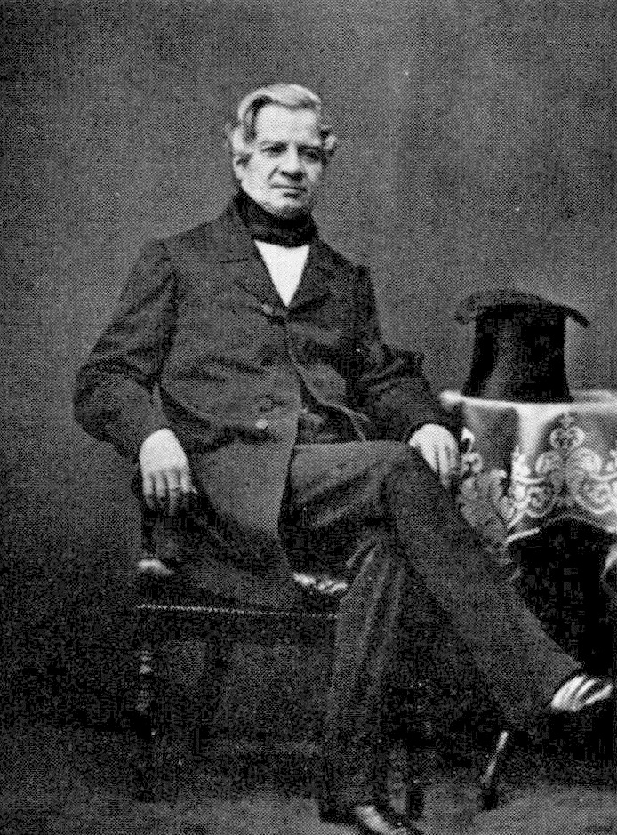 Claës Günther, Justitiestatsminister 1856-1858.